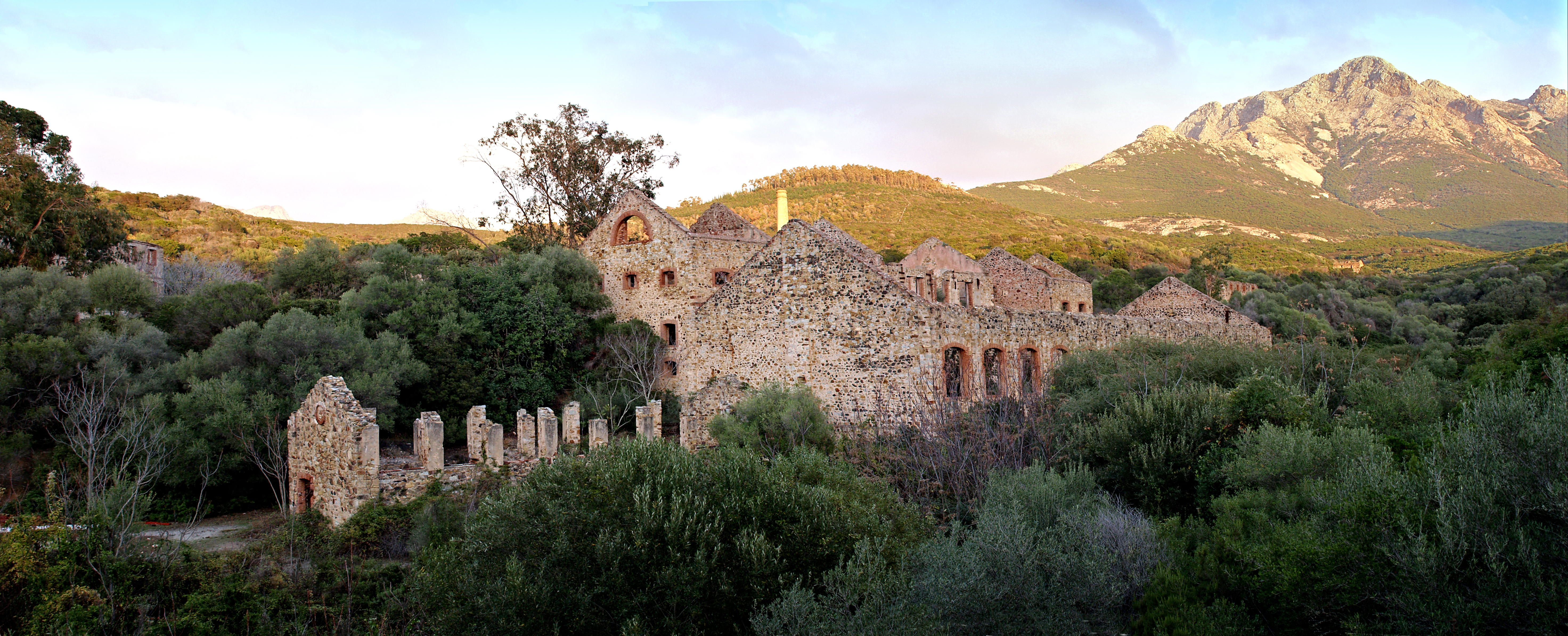 Calenzana (Corse) - Anciennes mines de plomb argentifère et de cuivre dites mines de l'Argentella